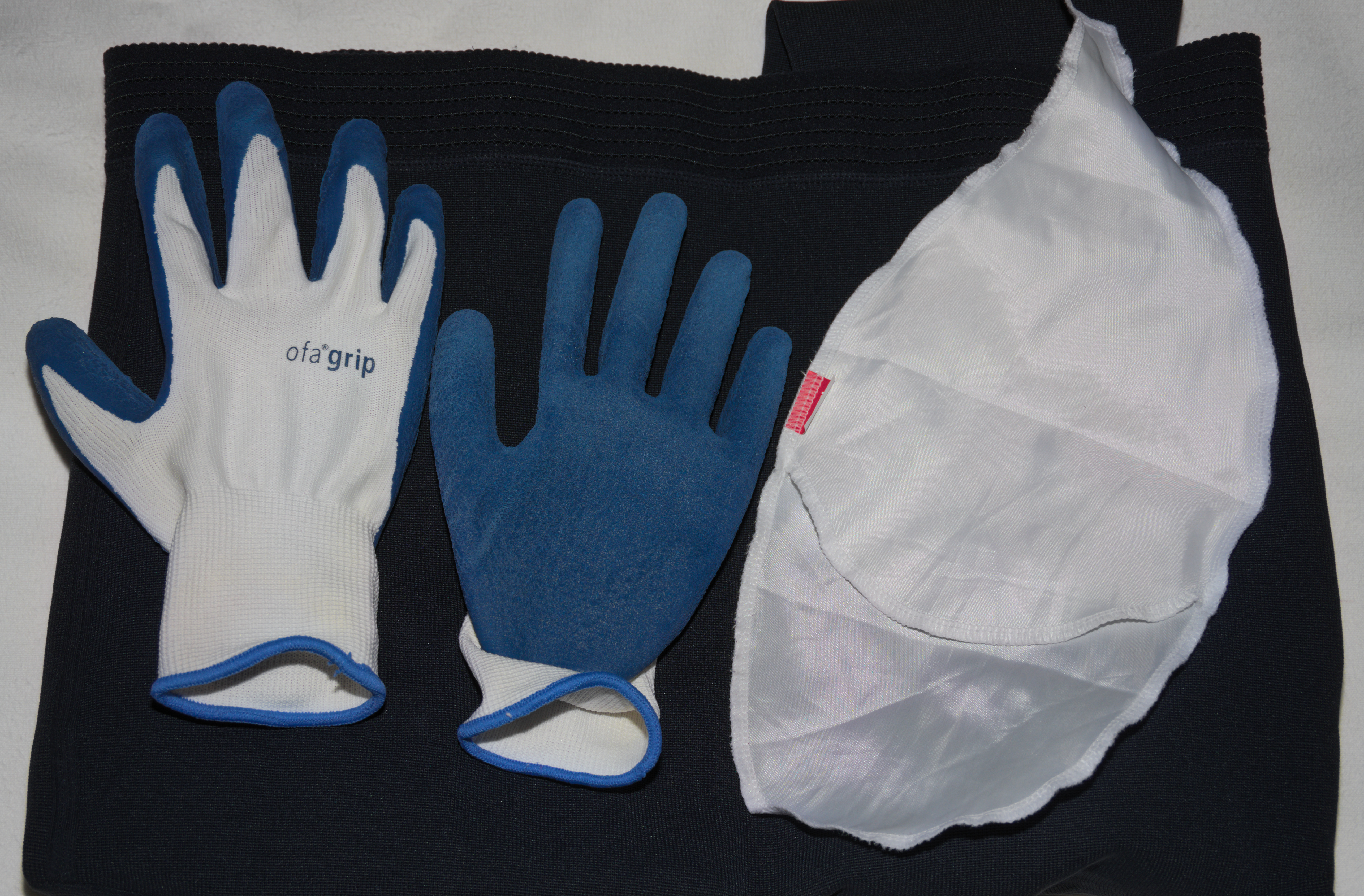 Textilhandschuhe mit Gummierung und Gleitsocke: Anziehhilfen für medizinische Kompressionsstrümpfe